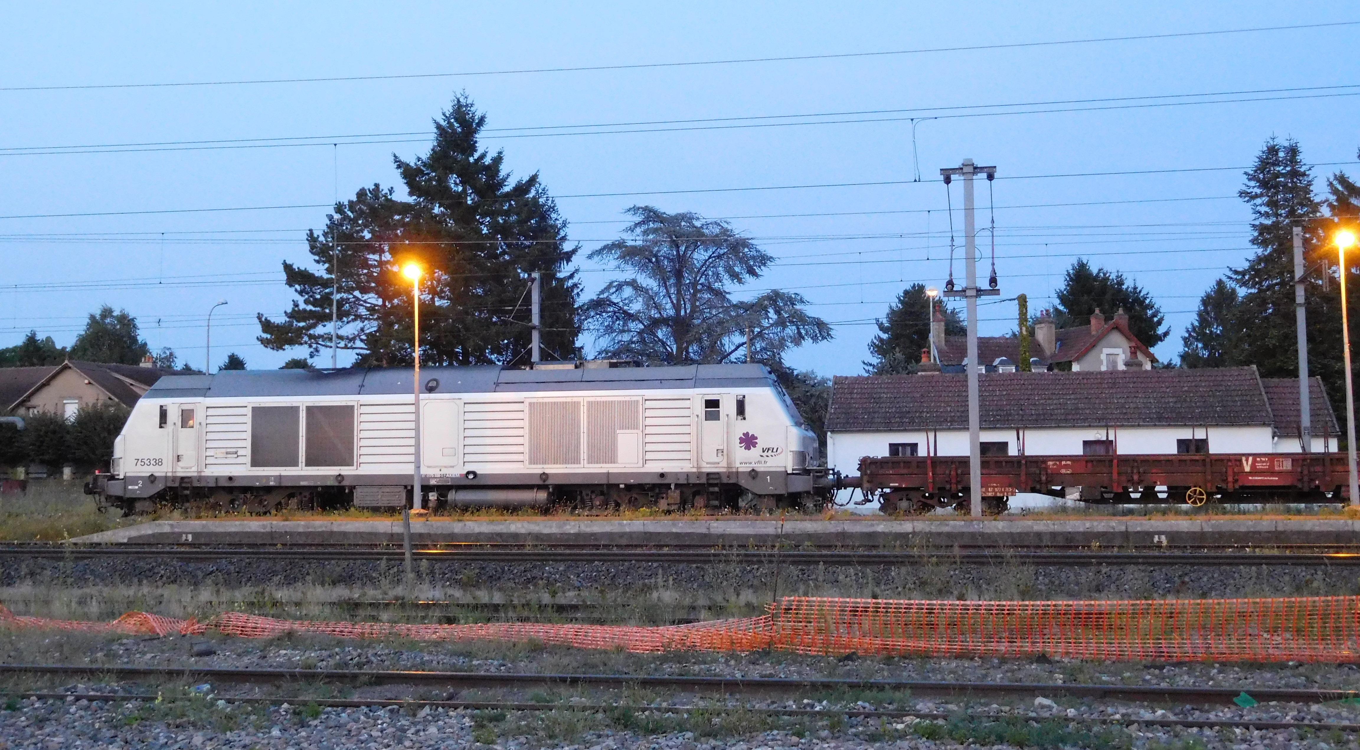 Locomotive BB 75338, livrée Akiem-ETF, portant le logo VFLI ; en queue d'un train de wagons-trémie (transport de ballast neuf), sur un canton de la gare de Cosne-sur-Loire (Nièvre, France). Le train va se diriger sur le chantier de rénovation de la voie 1, vers Nevers.